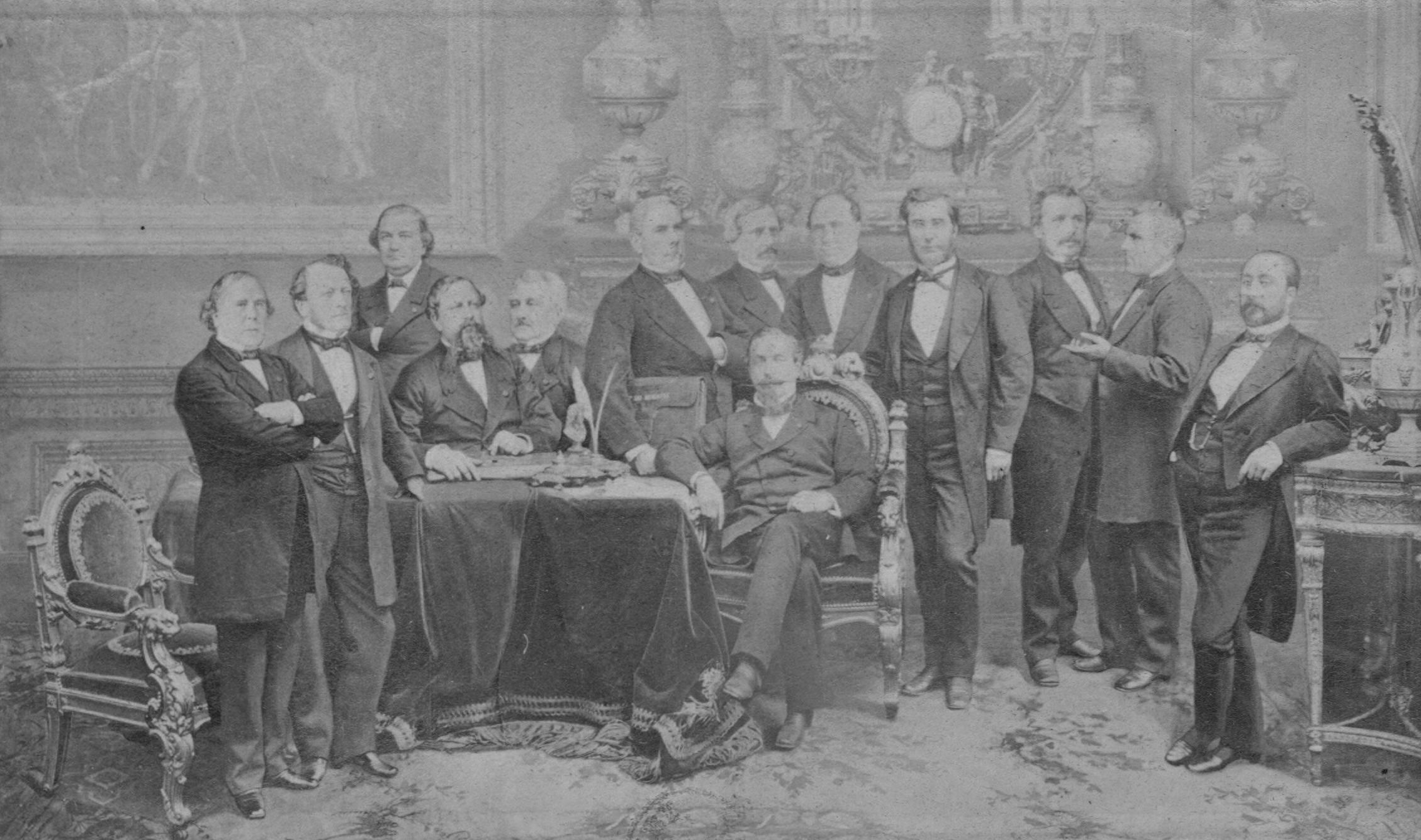 Ministère du [2] janvier 1870.